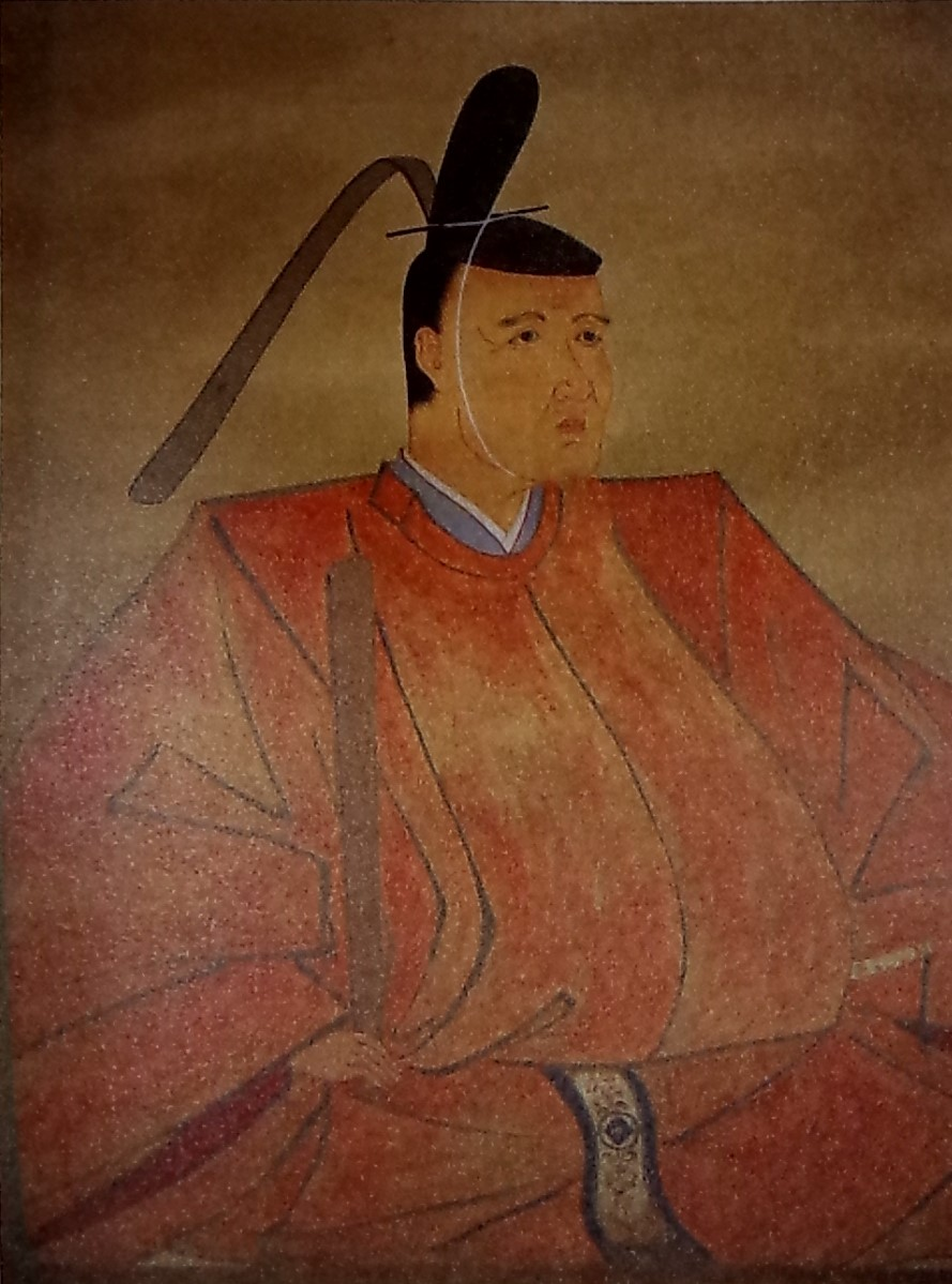 一柳直卿(頼徳)の肖像。